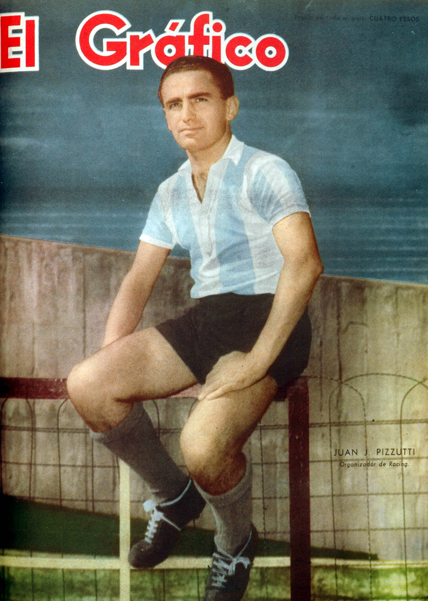 El Grafico del 08 de Enero de 1959. Edicion 2052